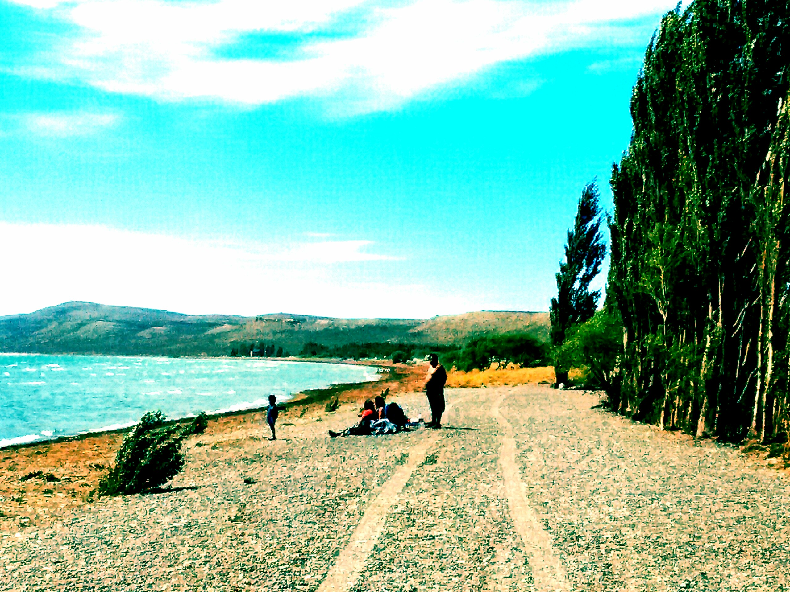 Playa arbolada sobre el lago